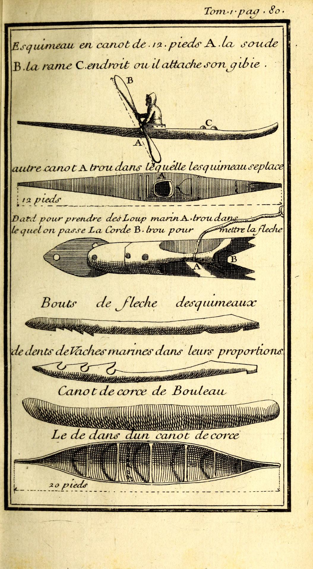 Dessins de 1722 représentants des modèles de canoés, de kayaks et de harpons inuits vus dans les parages de la baie d'Hudson. Publiés dans l'Histoire de l'Amérique septentrionale, par Claude-Charles Bacqueville de La Potherie, Paris.